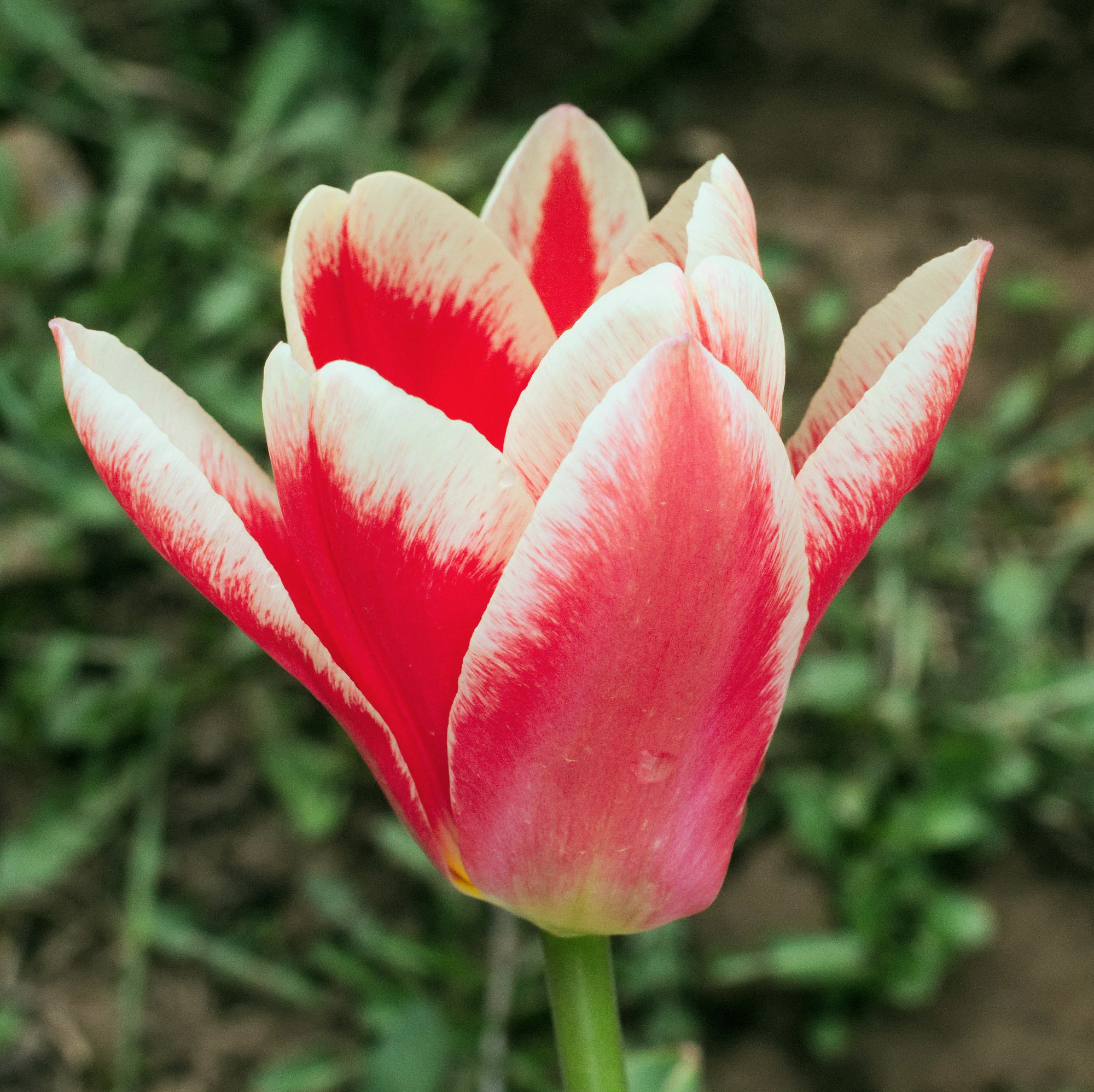 Тюльпан 'Pirand'